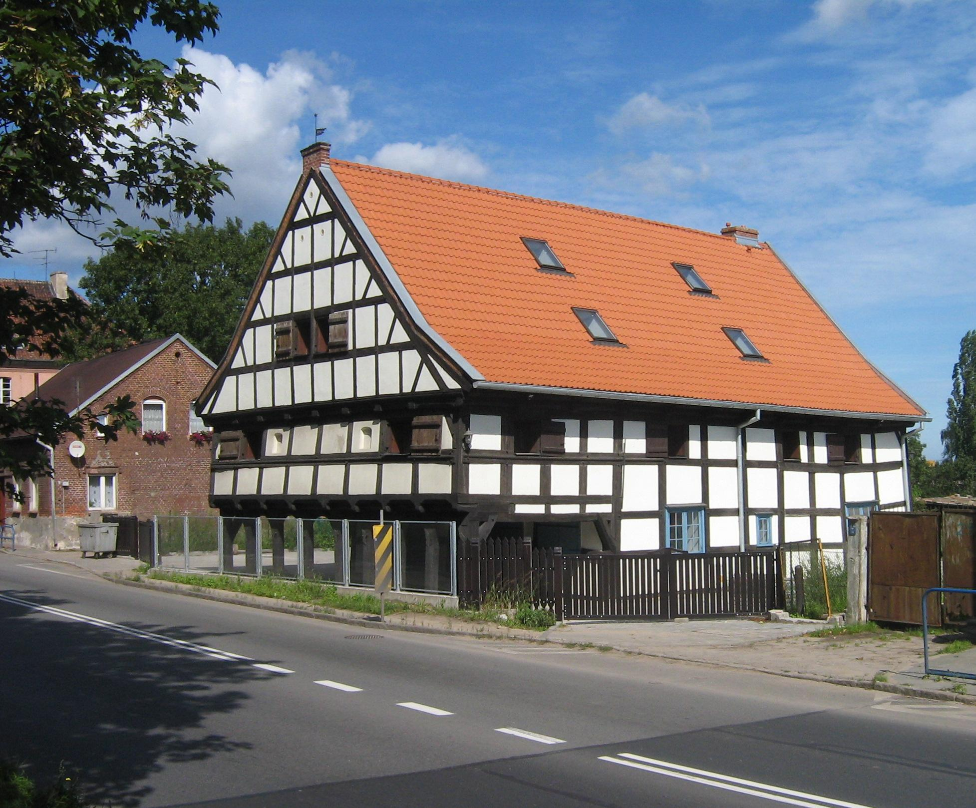 Gdańsk Lipce, Trakt św. Wojciecha 297 - dom podcieniowy (Lwi Dwór), poł. XVII